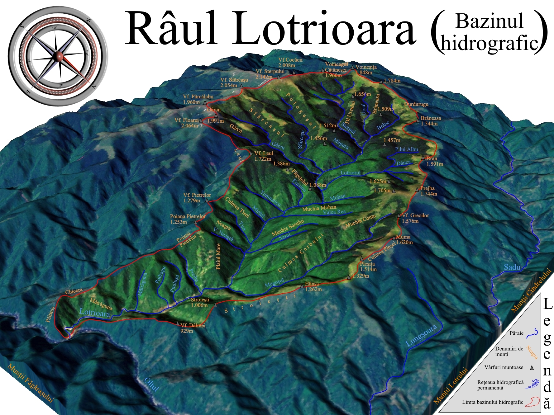 Harta 3D a Bazinului hidrografic al râului Lotrioara, afluent al Oltului. Selectați alte bazine hidrografice adiacente ale Defileului Oltului, menționate pe hartă în mod senzitiv cu chenare de note informative.